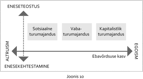 Turumajanduse mudelid paigutatuna võrdsuse teljele.